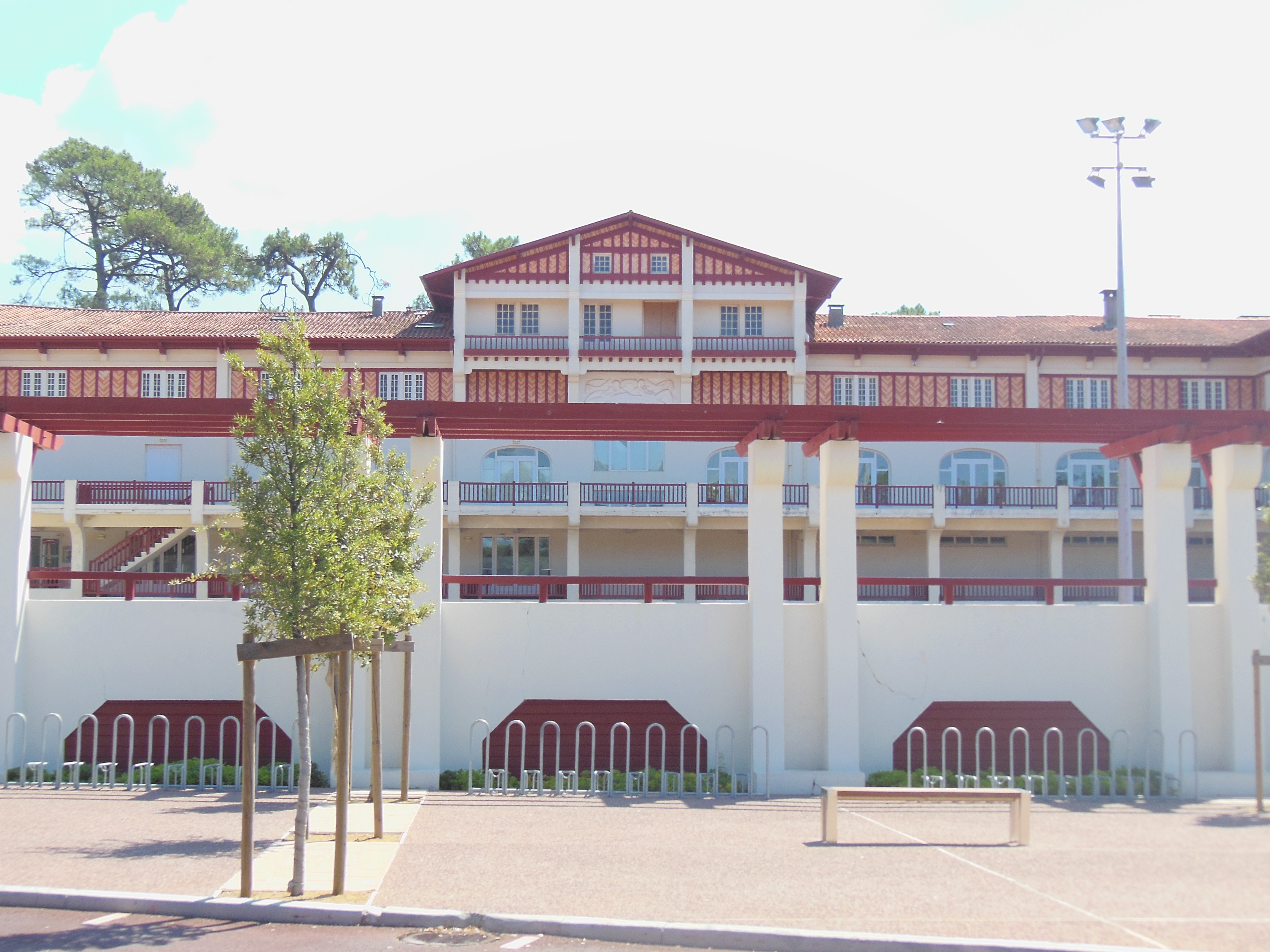 Sporting Casino à Soorts-Hossegor, dans le département français des Landes